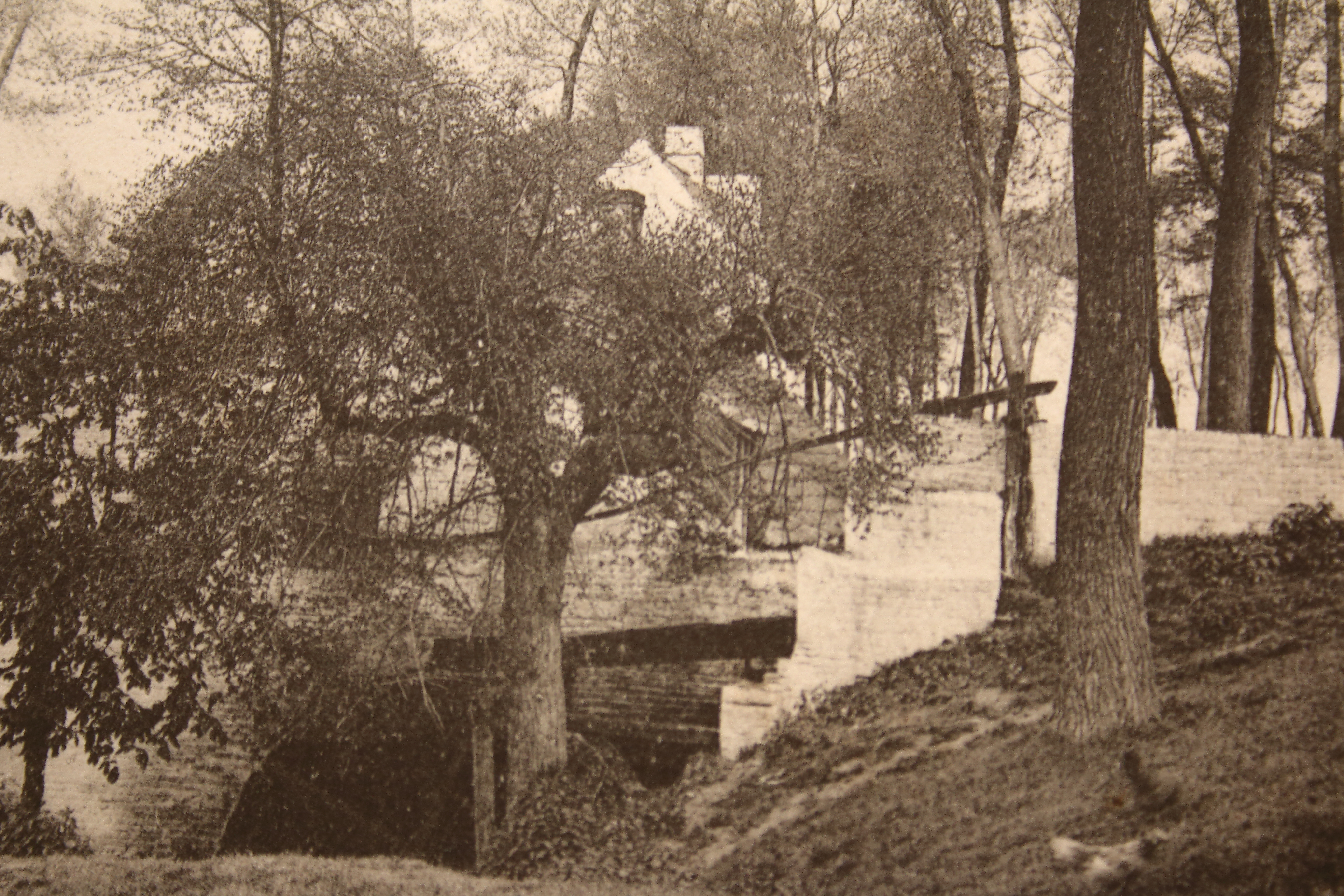 Leirenshof en Leirensmolen, Zottegem, Vlaanderen, België (historische prentbriefkaart)